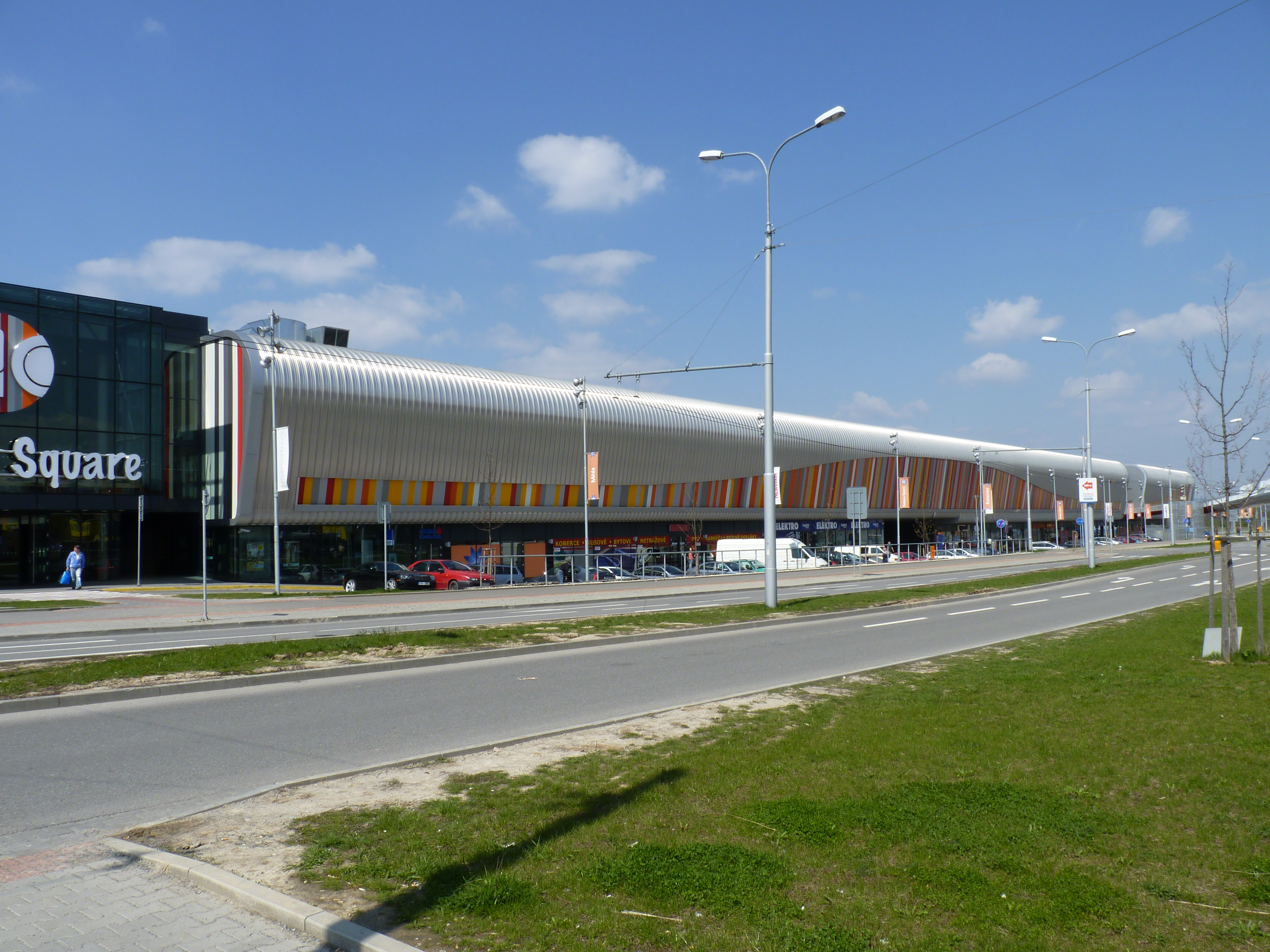 Campus Square v Bohunicích, Brno